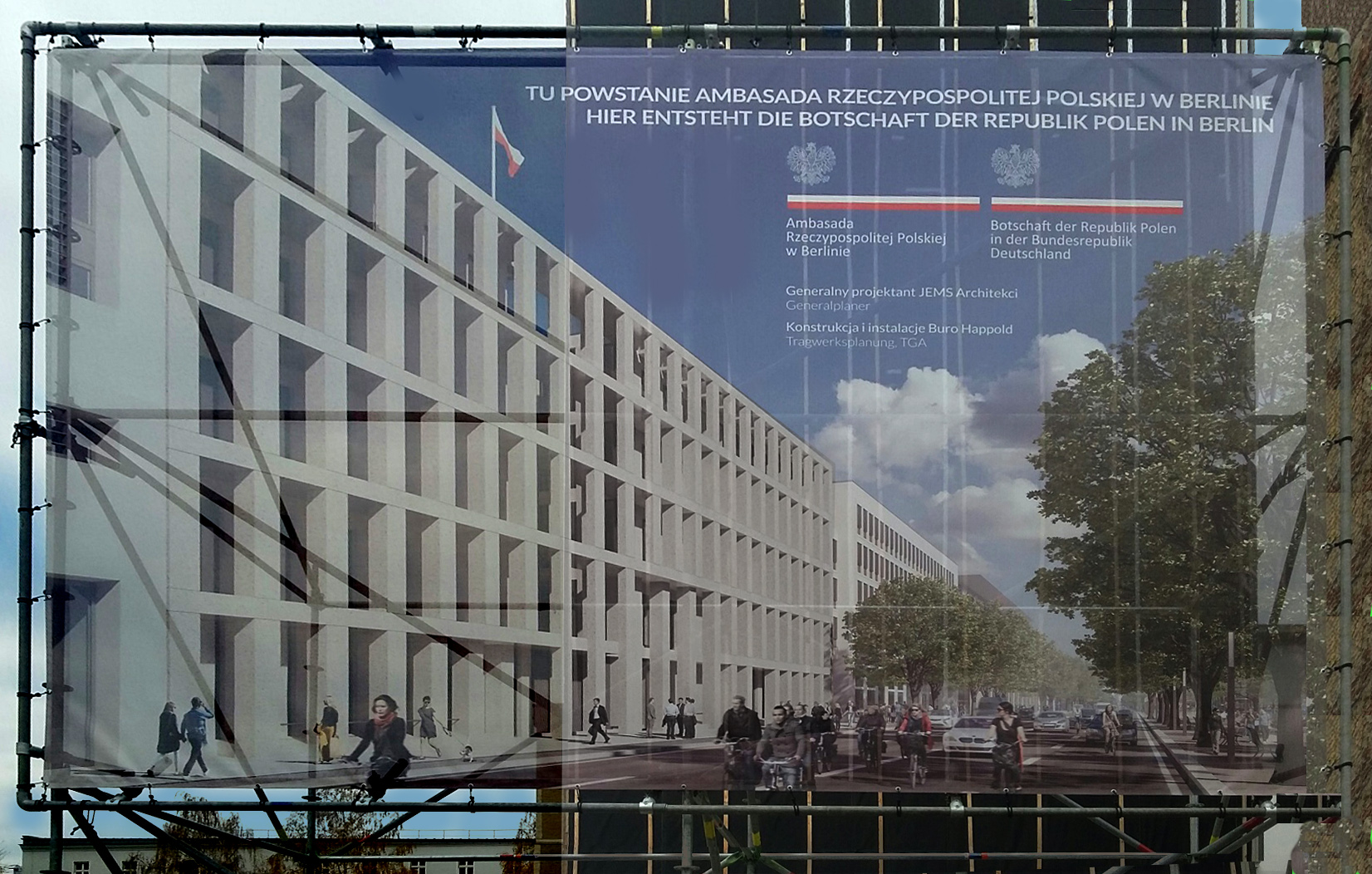 Neues Botschaftsgebäude Entwurf 2018